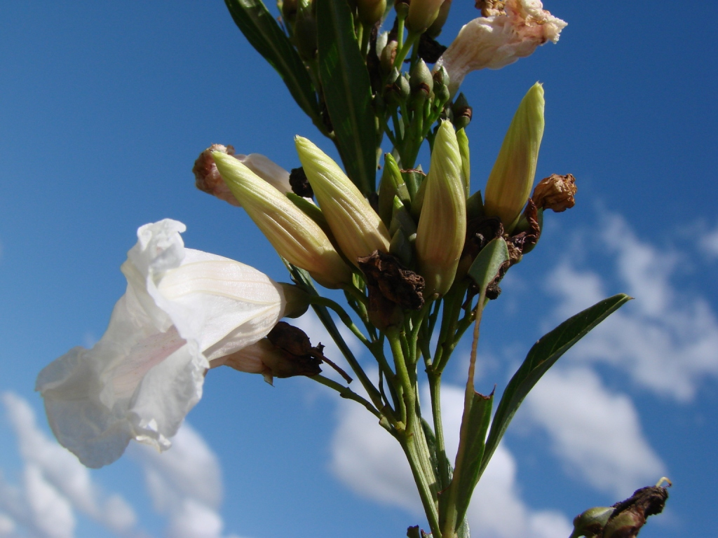 Ipomoea squamisepala - CONVOLVULACEAE Cachoeira do Tororó - Brasília - Distrito Federal - Brasil.